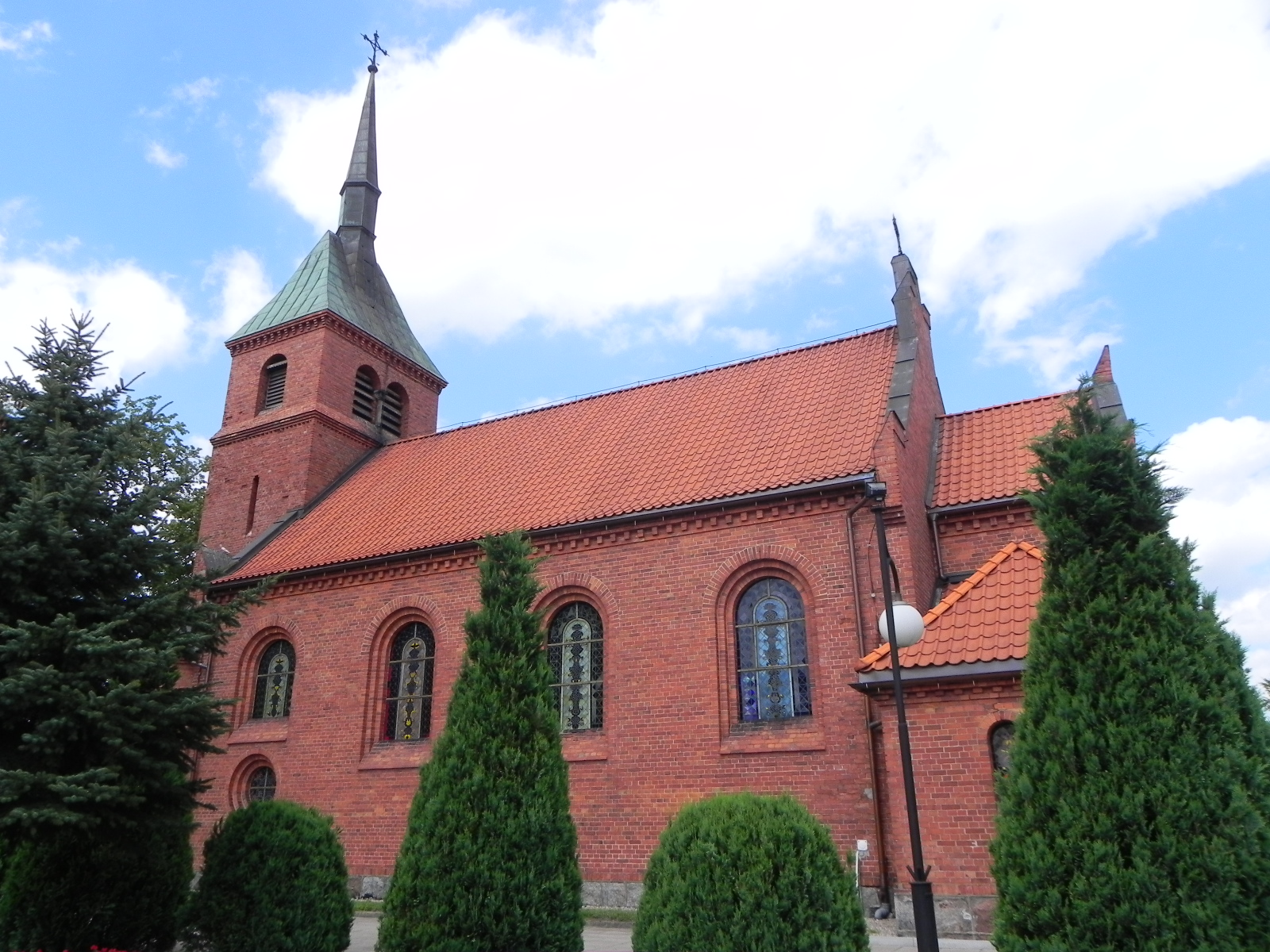 Sierakowice, ul. Kartuska 25a - dawny kościół ewangelicki, obecnie rzymskokatolicki parafialny pw. św. Jana Chrzciciela, 1890.